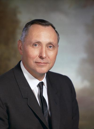 Senator Wilbur G. Hallauer, 1967